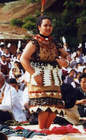 Lea faka-Tonga: no original description